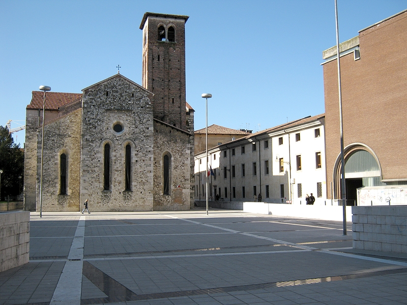 Piazza Venerio a Udine, anticamente sede del palazzo di Antonio Savorgnan, demolito nel XVI secolo.